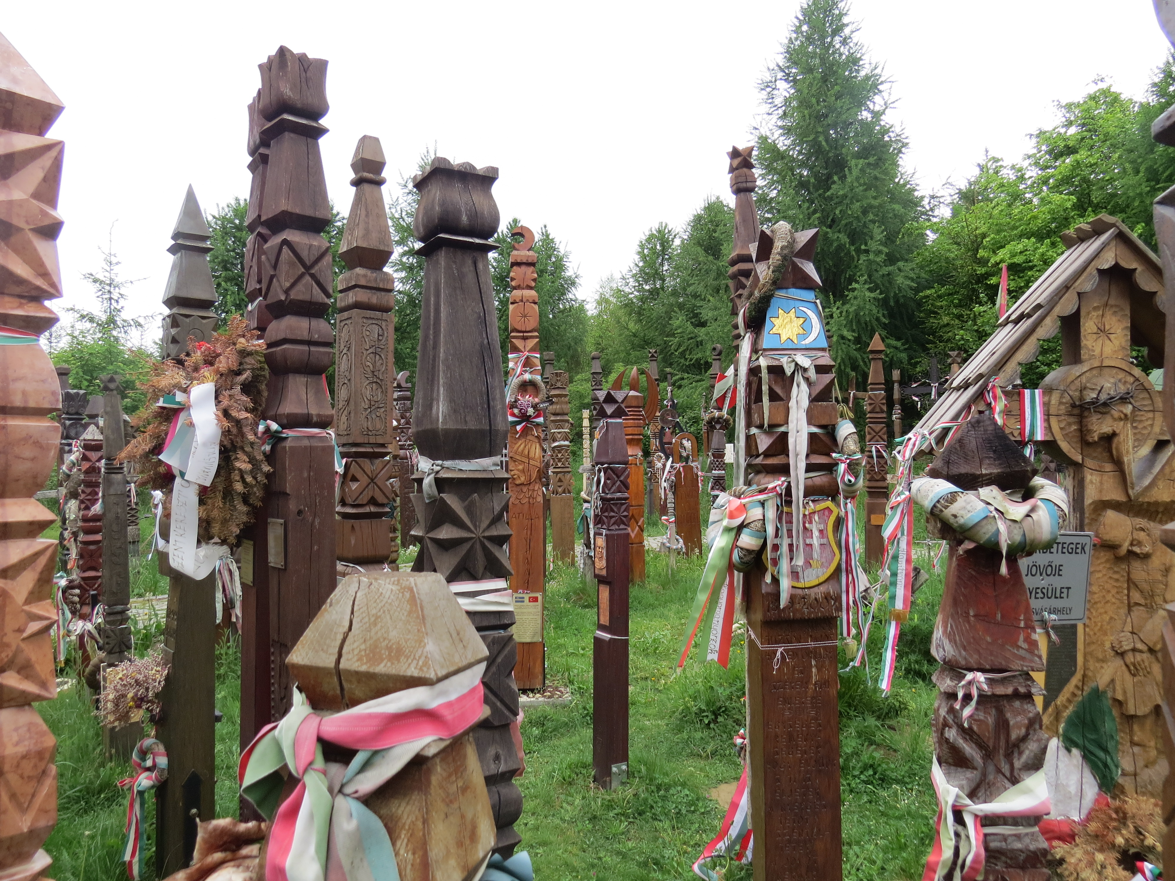 Nyerges-tető, az 1848–49-es forradalom és szabadságharc egyik utolsó székelyföldi csatájának színhelye. Az erdő szélén lévő területen, egy tömegsírba hantolták el akkor az ütközet áldozatait, akiknek emlékét többek közt számtalan kopjafa őrzi.